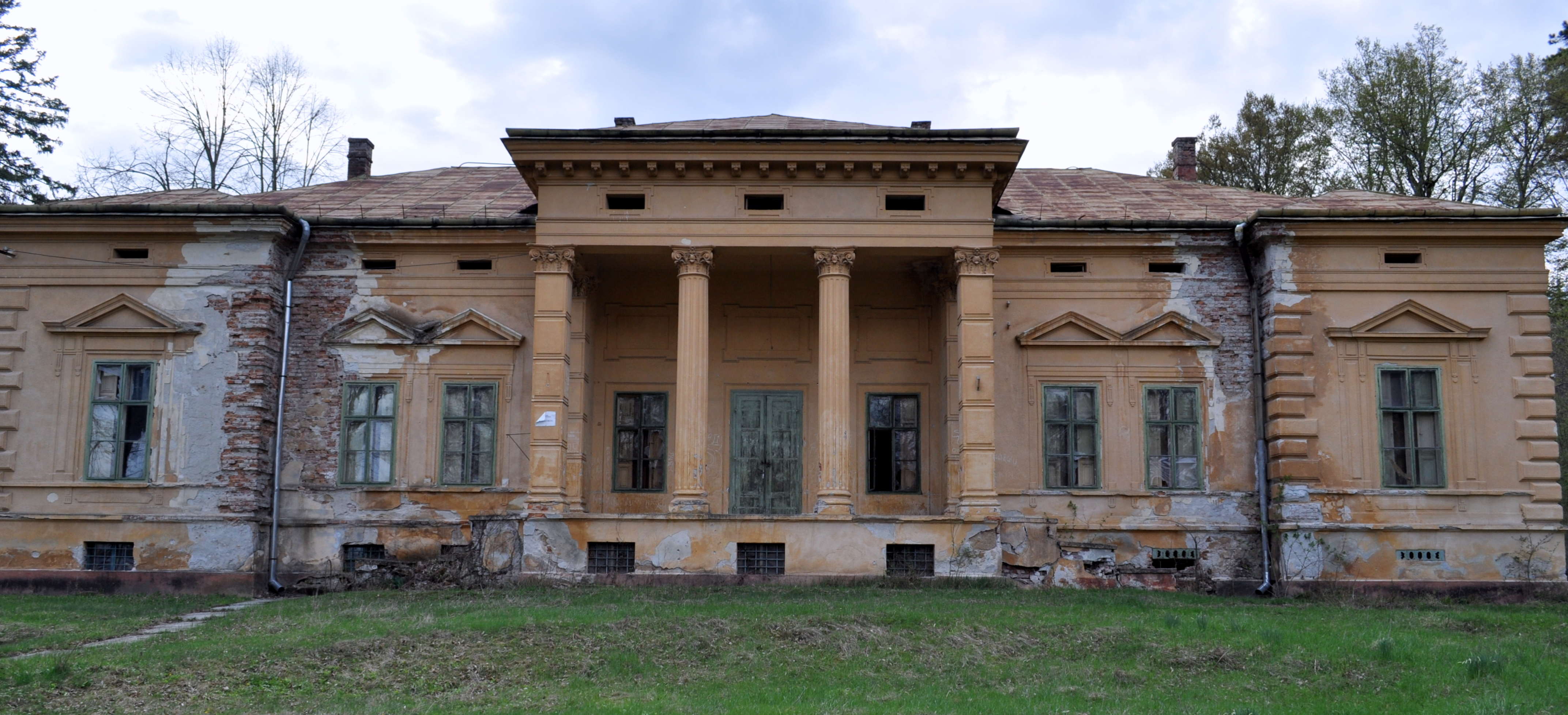 Castelul Konopi, sat Odvoș; comuna Conop, județul Arad 01